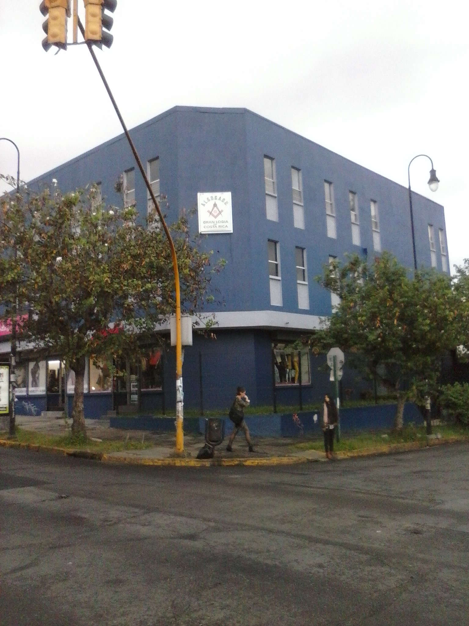 Edificio sede de la Gran Logia Masónica de Costa Rica, fotografía tomada con la cámara de mi celular.